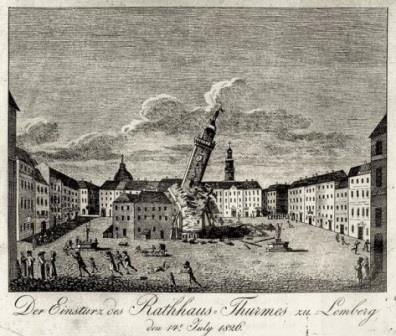 Падіння Львівської ратуші 1826р., гравюра очевидця